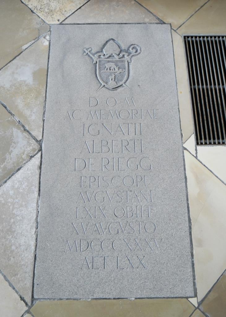 Grab des Bischofs Ignaz Albert von Riegg, 1767-1836, im Hohen Dom in Augsburg